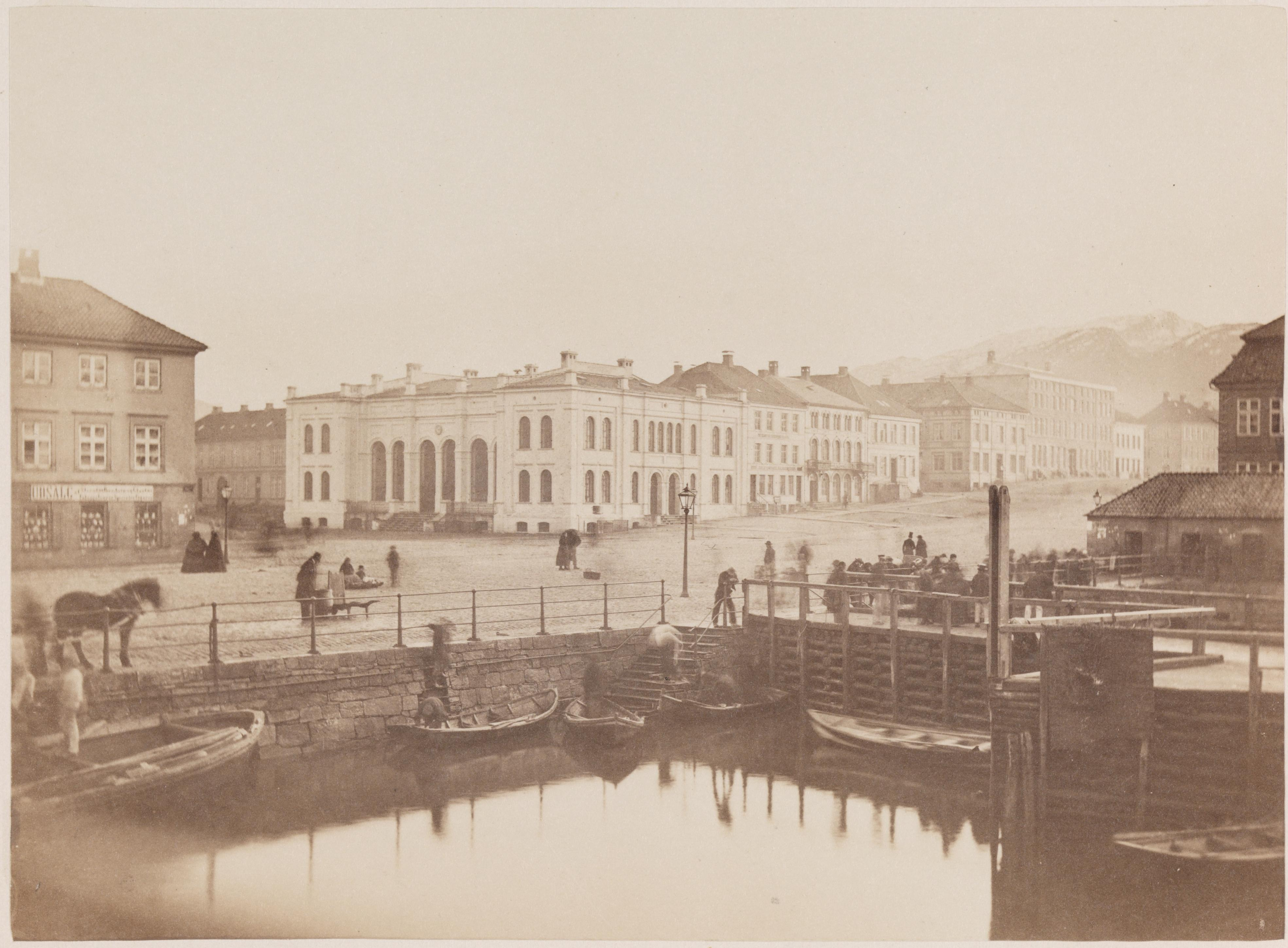 Bildet er hentet fra Nasjonalbibliotekets bildesamling. Anmerkninger til bildet var: Del av serien "Norske Prospecter"